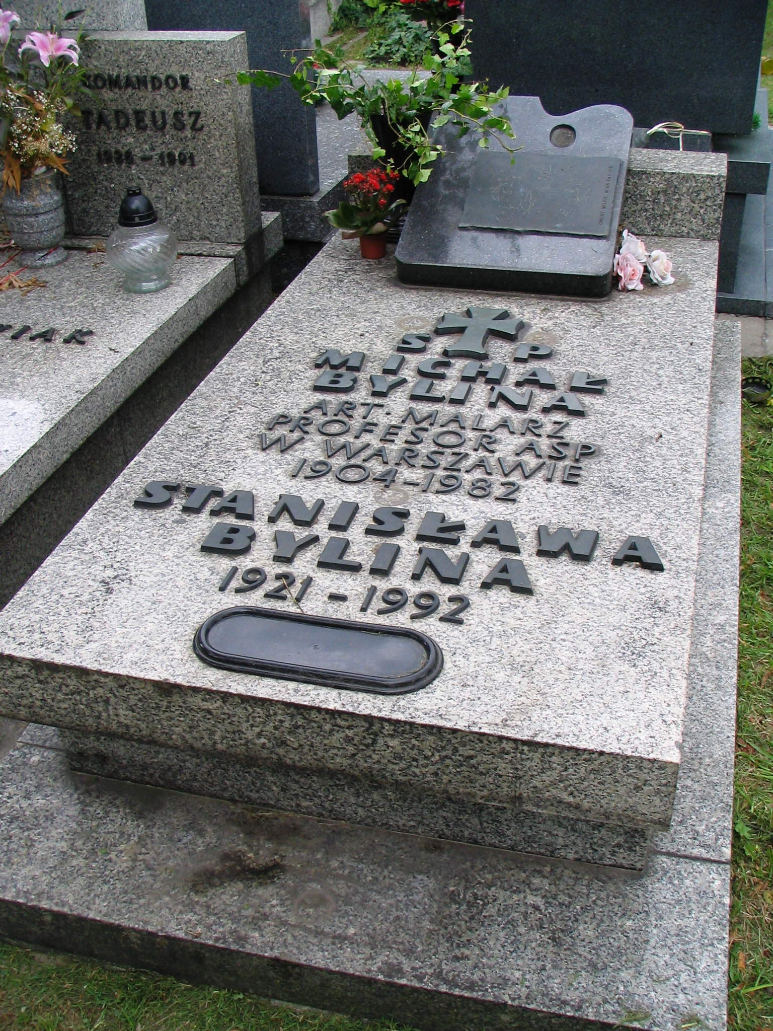 Grób prof. Michała Byliny